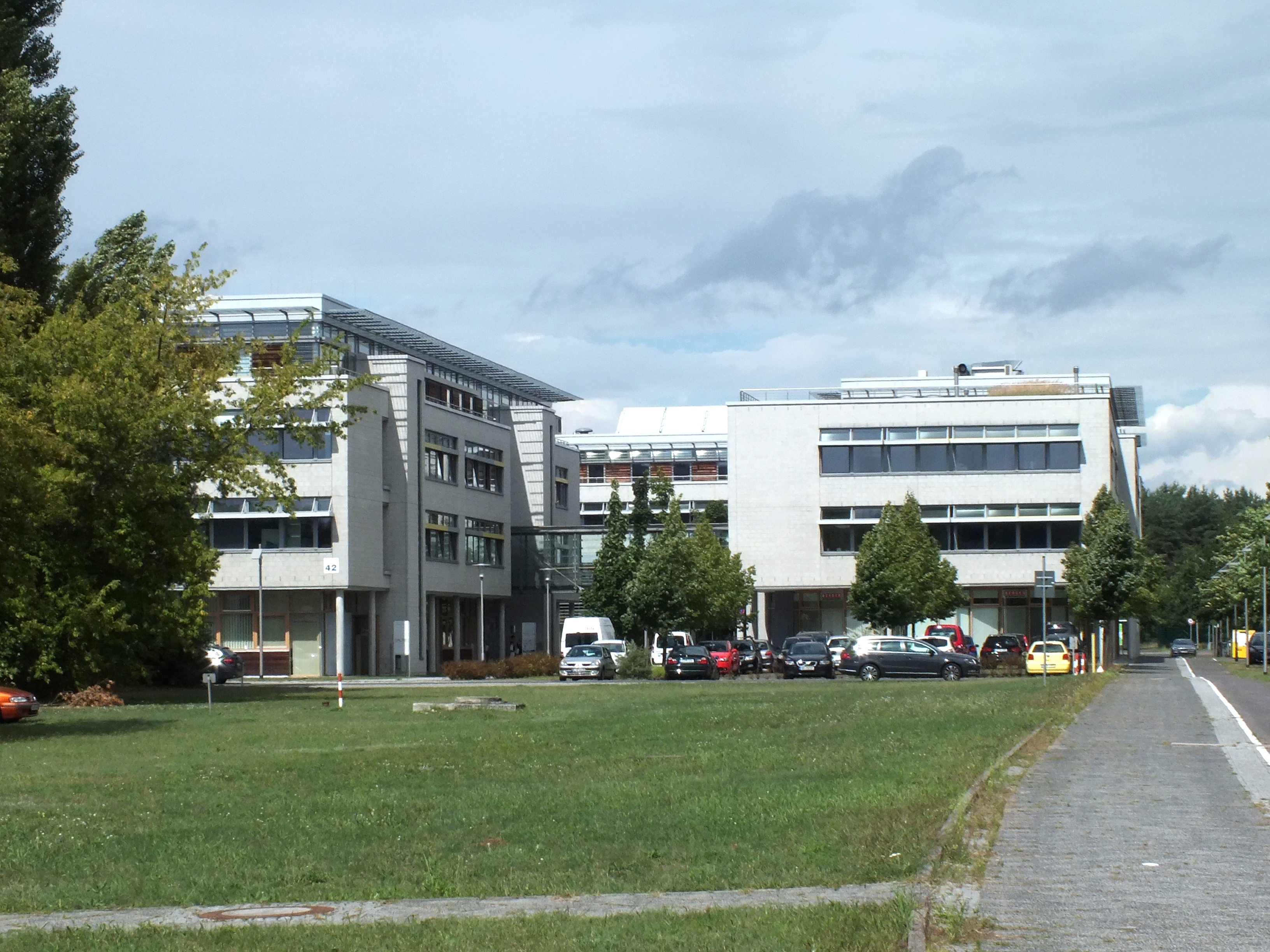 Straße in Berlin-Köpenick, Hämmerlingstraße mit Ardenne-Zentrum im Innovationspark Wuhlheide